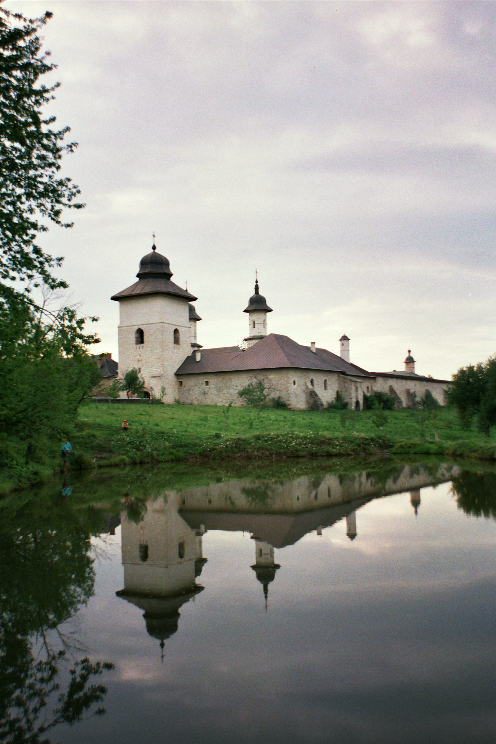 Mănăstirea Râşca - vedere de ansamblu